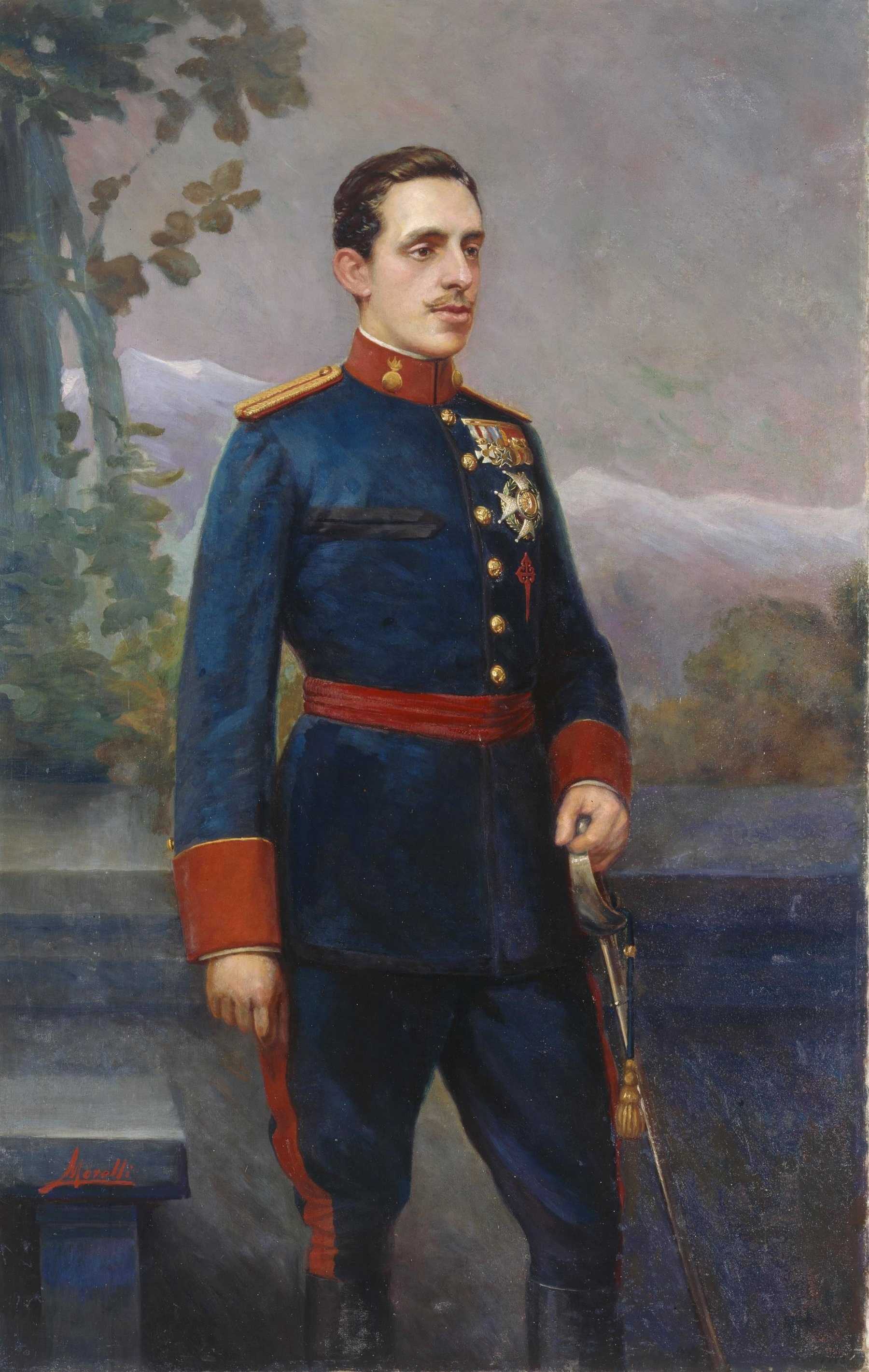 Retrato del rey Alfonso XIII de España (1886-1941). El monarca, que aparece con el uniforme de capitán general de Artillería, luce la cruz roja de la Orden de Santiago, la gran cruz laureada de San Fernando y un pasador con las veneras de otras condecoraciones.